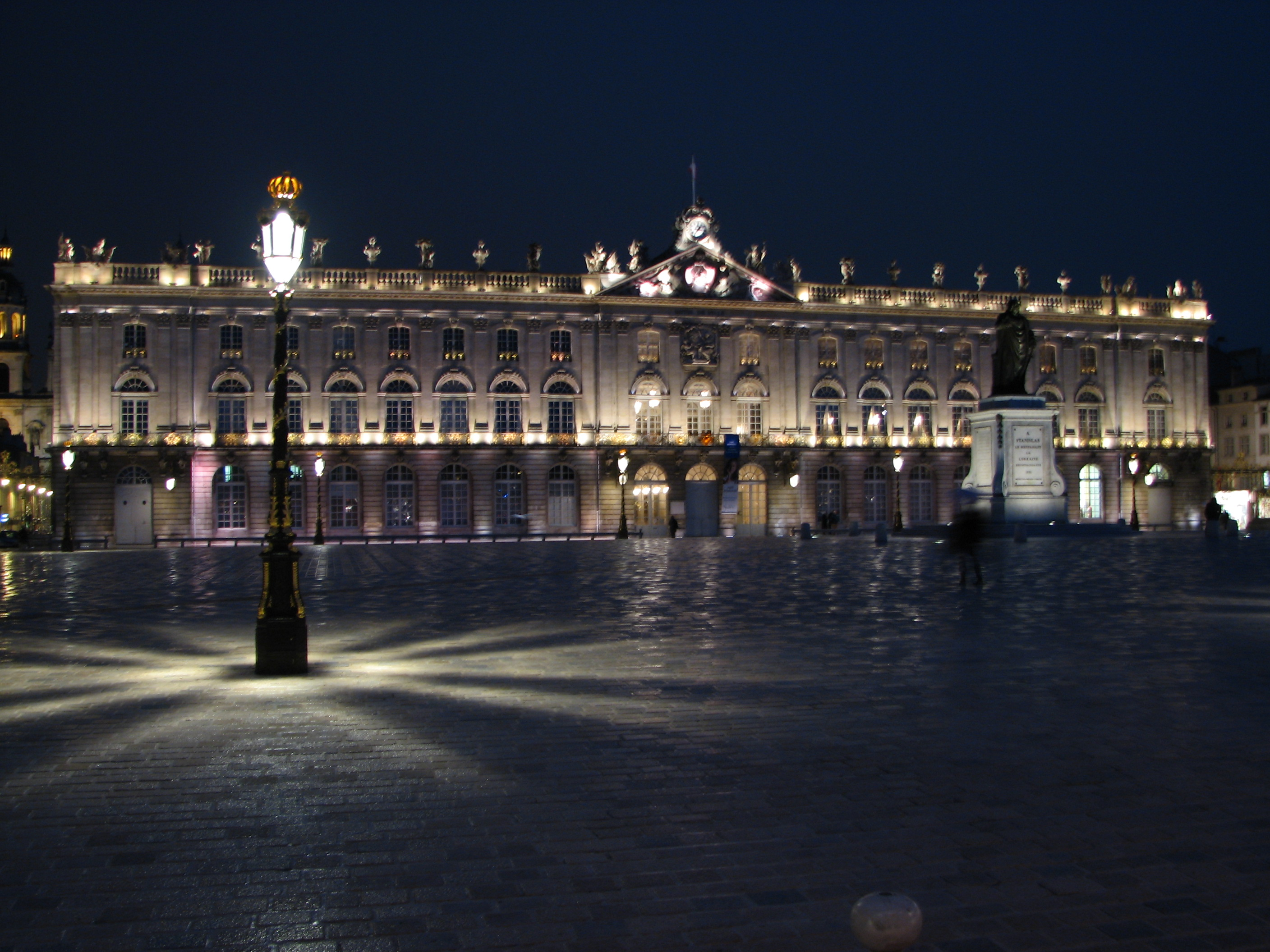 Place Stanislas, Nancy, la nuit